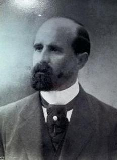 Retrat d'Agustí Riera i Pau